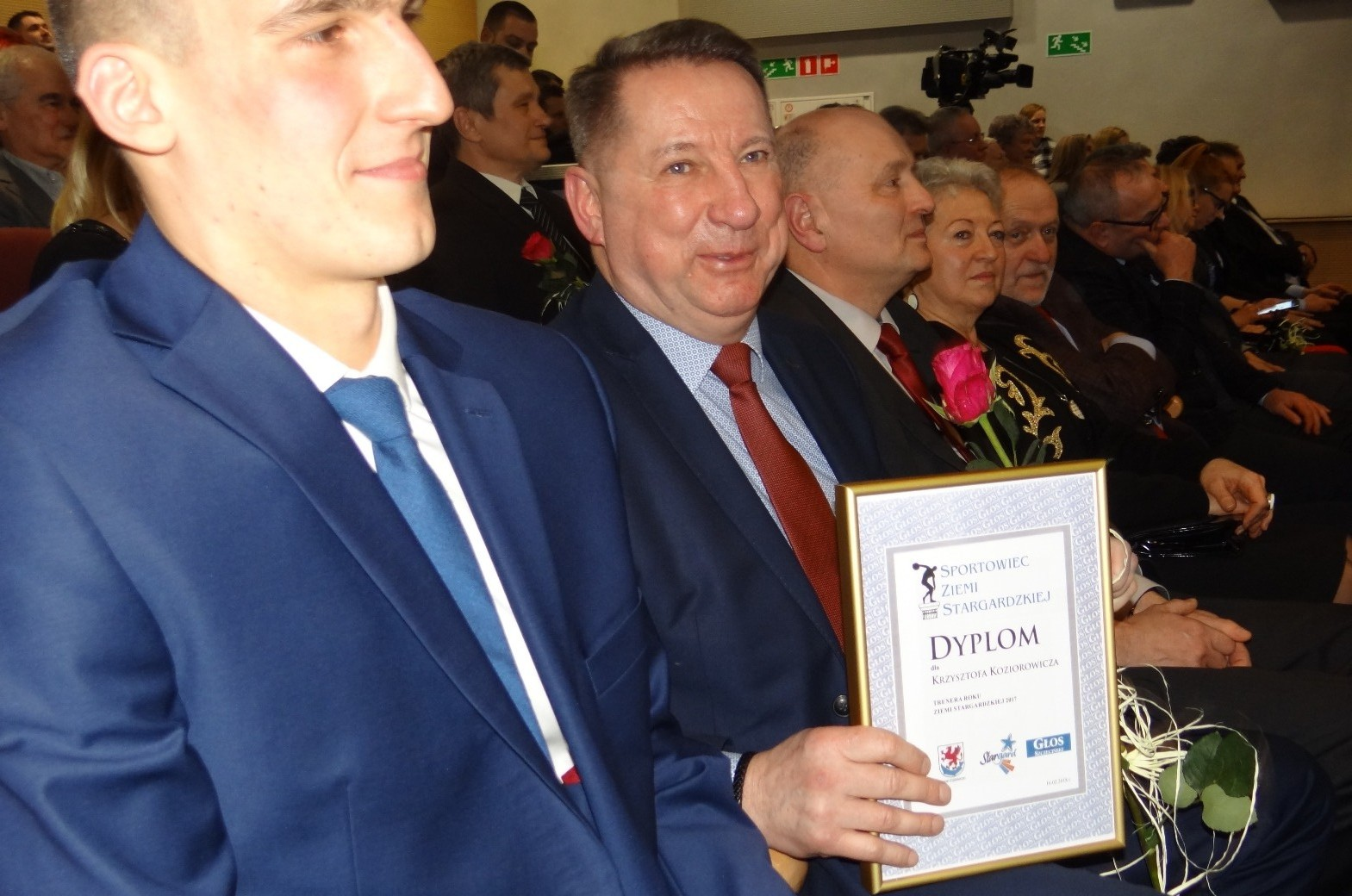 Trener Krzysztof Koziorowicz podczas gali